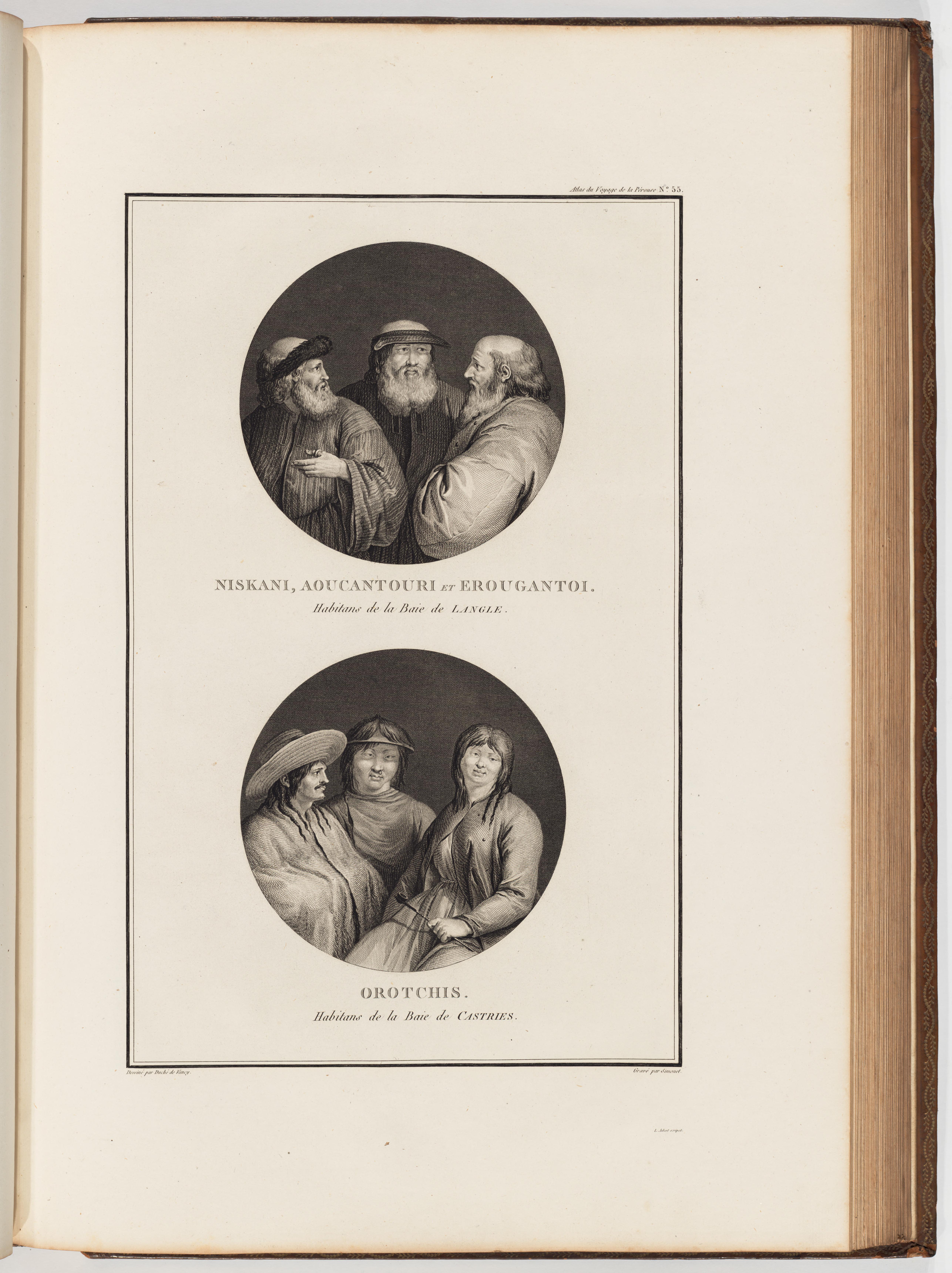 Voyage de La Pérouse autour du monde /publié conformément au décret du 22 avril 1791, et rédigé par L.A. Milet-Mureau.